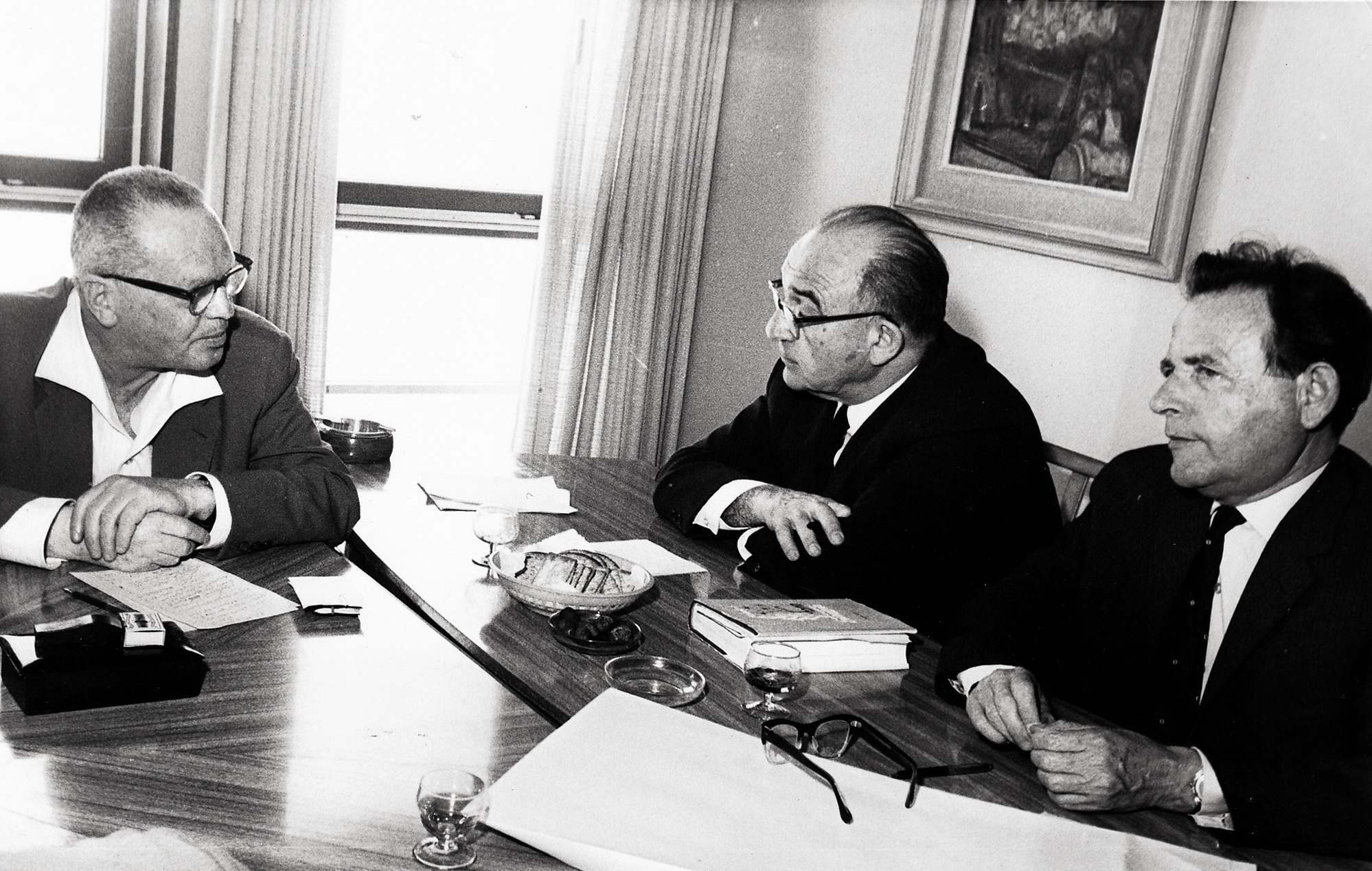 מימין לשמאל: א. בקר, מזכיר ההסתדרות ל. אשכול, ראש הממשלה ז. און, מזכיר חברת העובדים. תל אביב - 6.4.1964